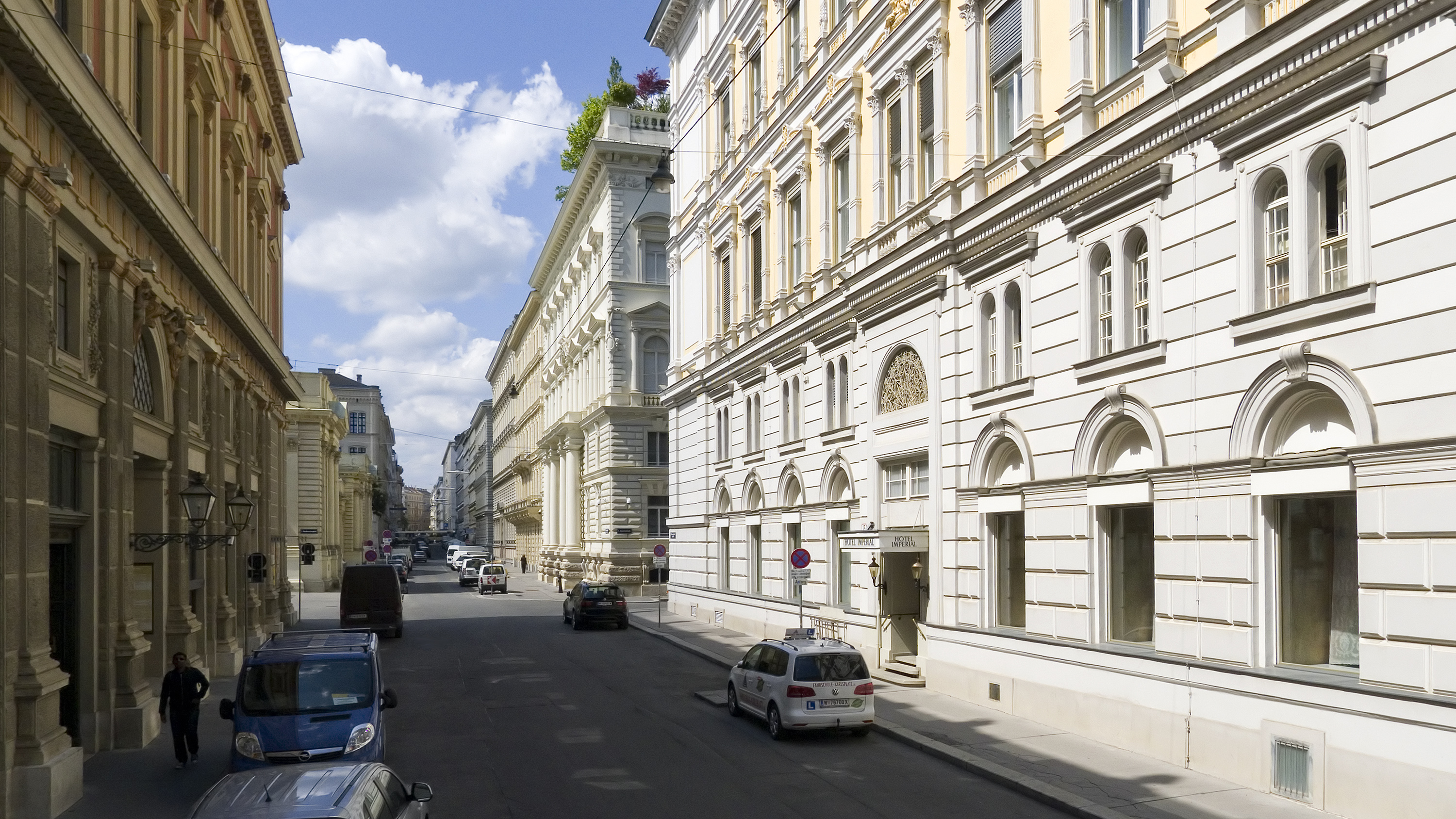 Bösendorferstraße in Wien 1 bei Nr. 12 Richtung Westen